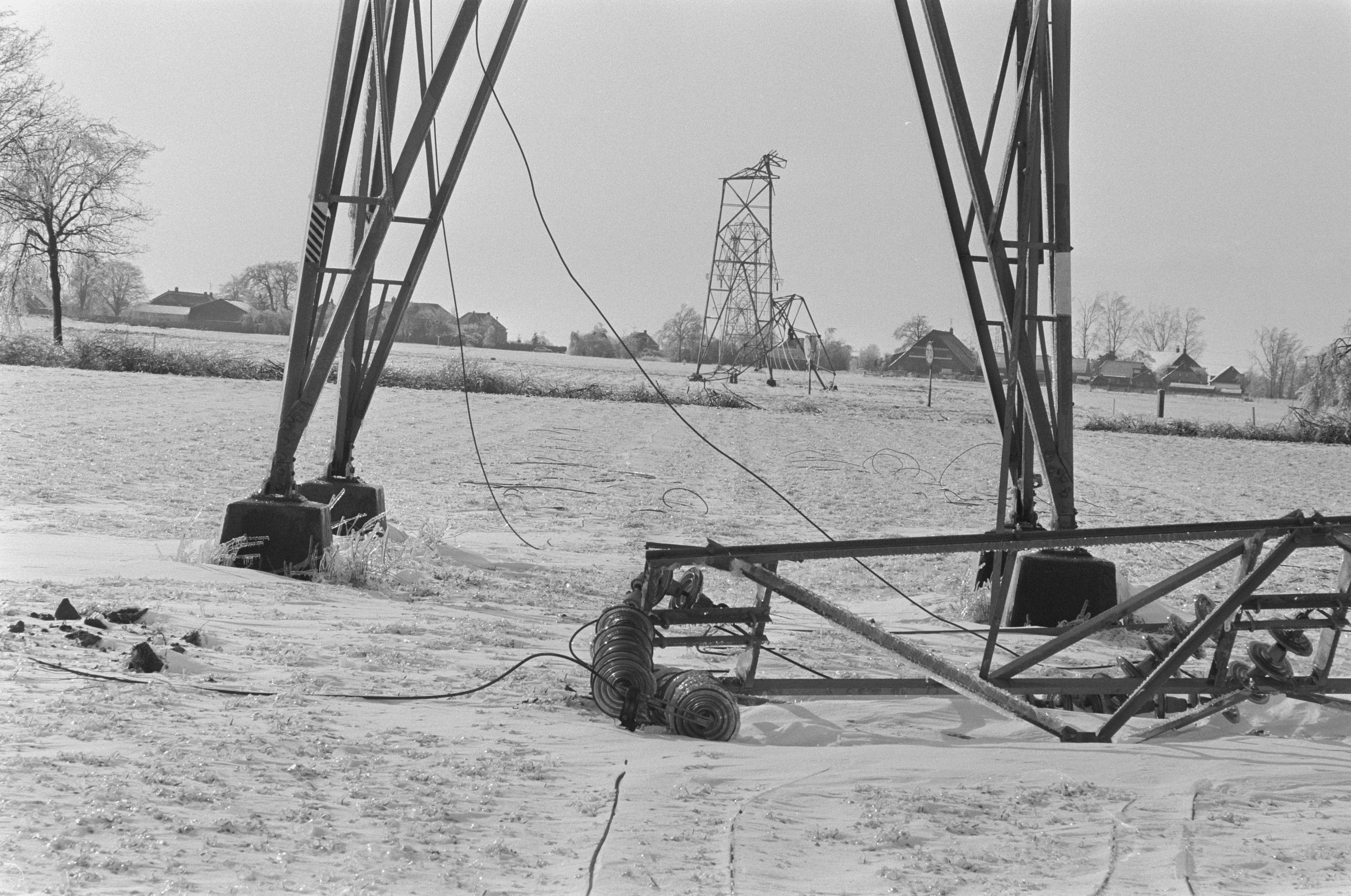 Collectie / Archief : Fotocollectie Anefo Reportage / Serie : [ onbekend ] Beschrijving : Overlast door ijzel in noorden van het land; afgebroken hoogspanningsmast bij Veendam Datum : 3 maart 1987 Locatie : Groningen, Veendam Trefwoorden : IJZEL Fotograaf : Bogaerts, Rob / Anefo Auteursrechthebbende : Nationaal Archief Materiaalsoort : Negatief (zwart/wit) Nummer archiefinventaris : bekijk toegang 2.24.01.05 Bestanddeelnummer : 933-9104